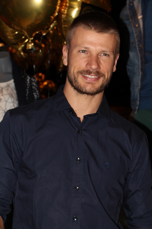 16 - Rodrigo Hilbert-004